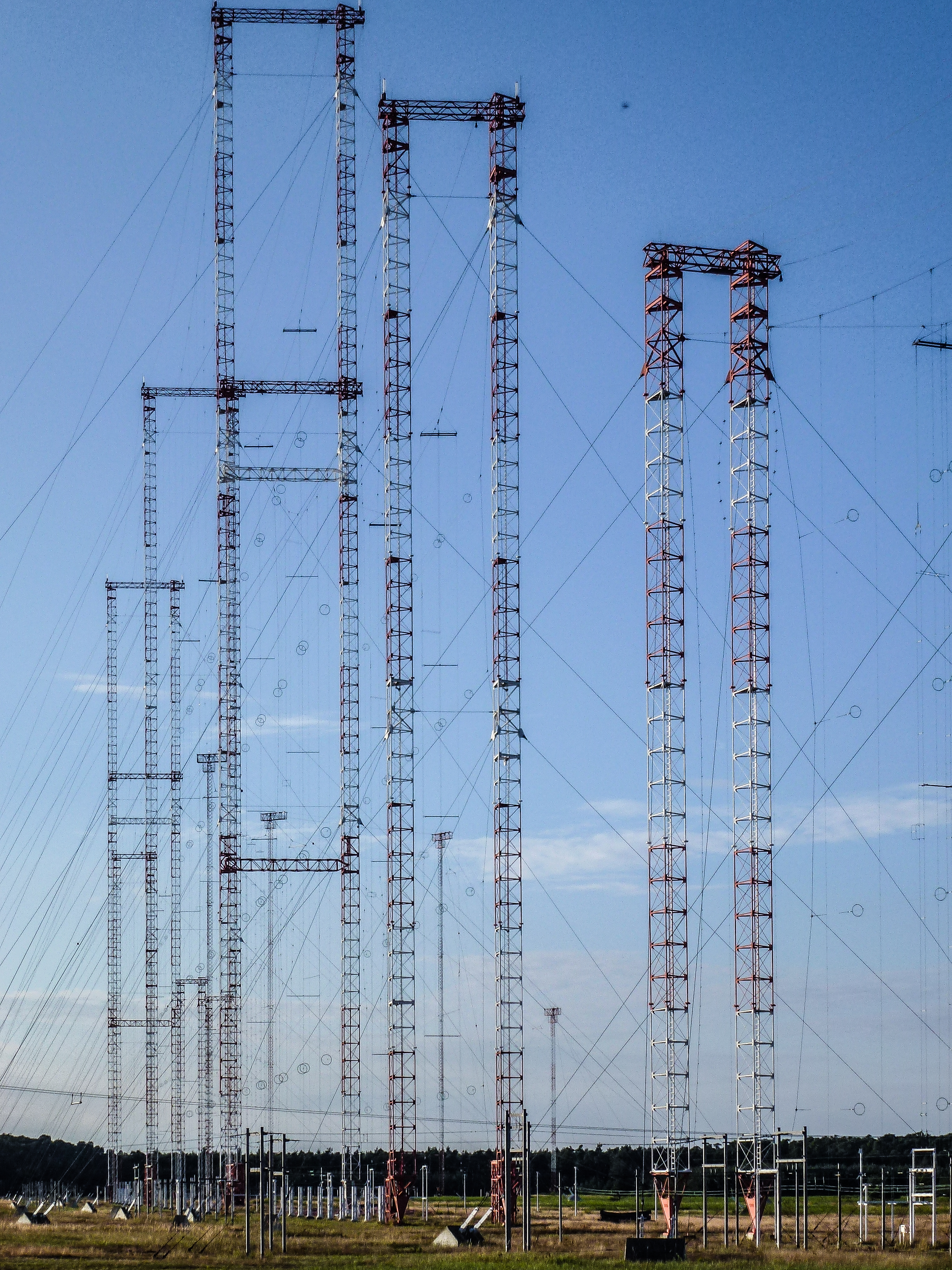 IBB Kurzwellensender in Lampertheim